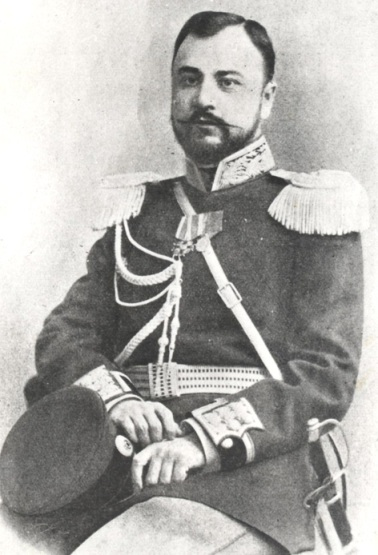 Süleyman bəy Sulkeviç (20.7.1865 - 15.7.1920) — hərbi xadim, general-leytenant (1915), Azərbaycan Xalq Cümhuriyyəti ordusunun Baş Ərkani-hərb (Baş qərargah) rəisi.